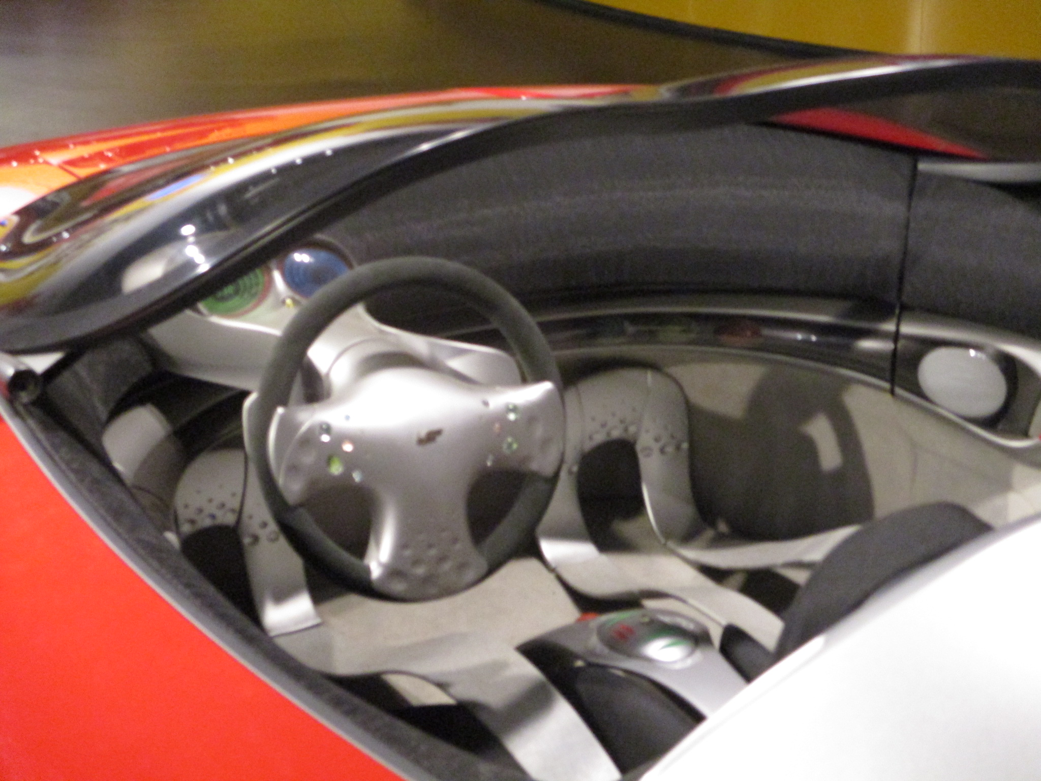 Ferrari Fioravanti F100R - Musée National de l'Automobile de Turin